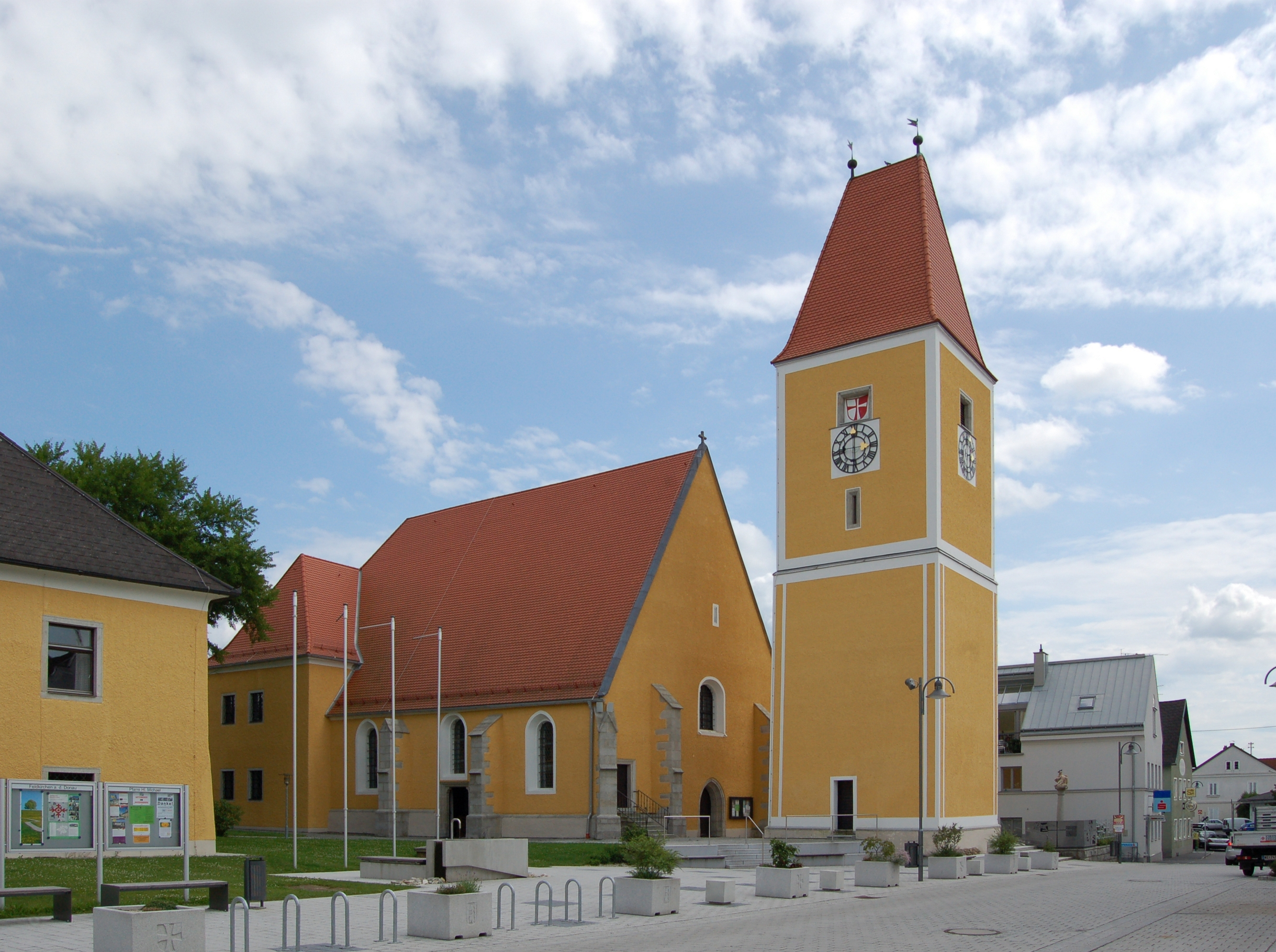 Die Pfarrkirche von Feldkirchen ist ein gotischer Kirchenbau mit einheitlicher Rokokoeinrichtung und freistehendem ehemaligen Wehrturm.